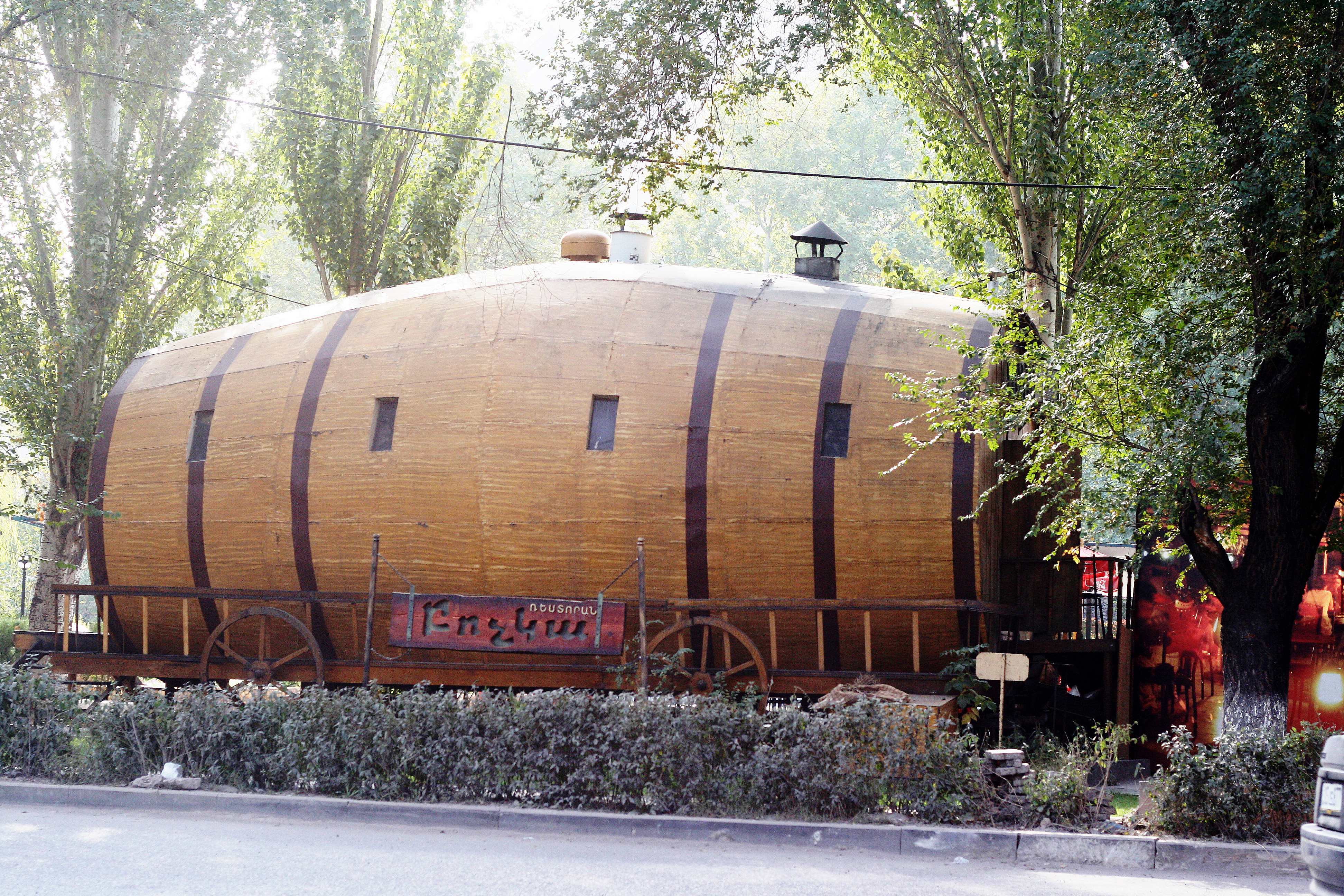 Restaurant à vin à Yerevan